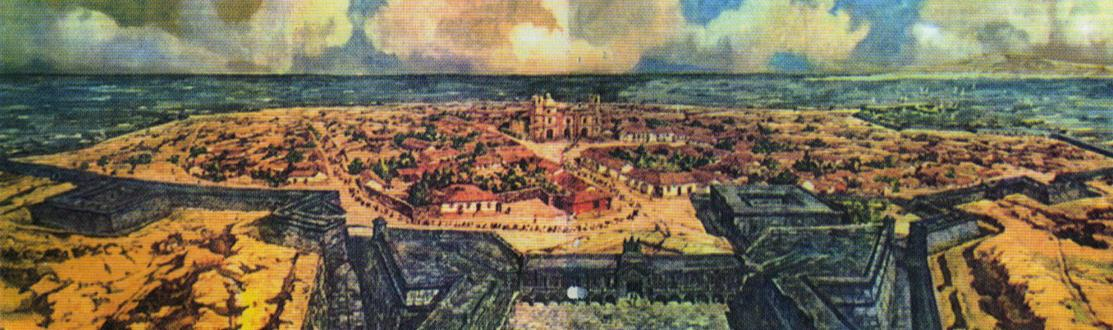 Panorámica de la Ciudad de Montevideo a fines del siglo XVIII —con la Ciudadela en primer plano— según una reconstrucción de Leonie Matthis.